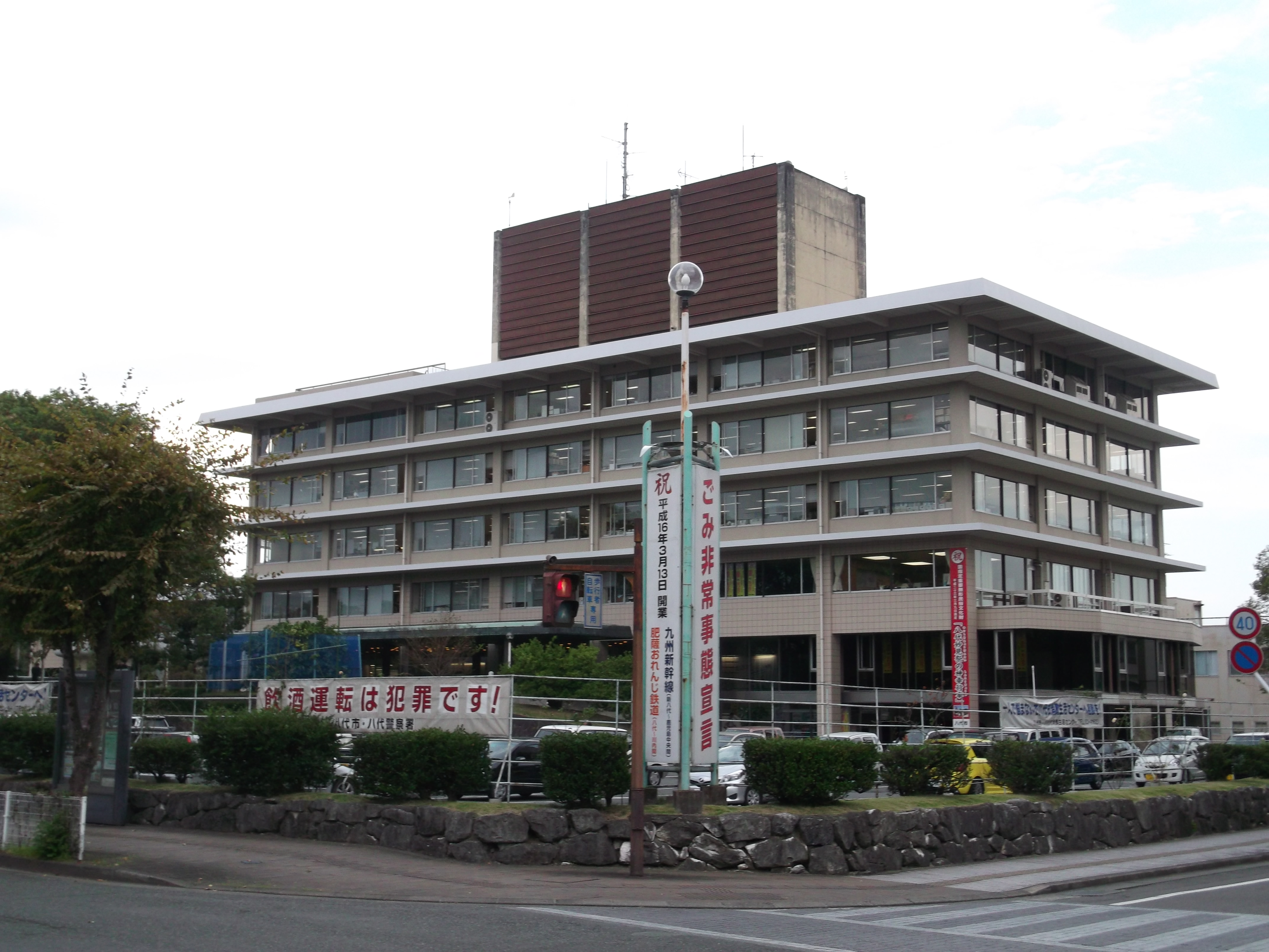 八代市役所本庁舎